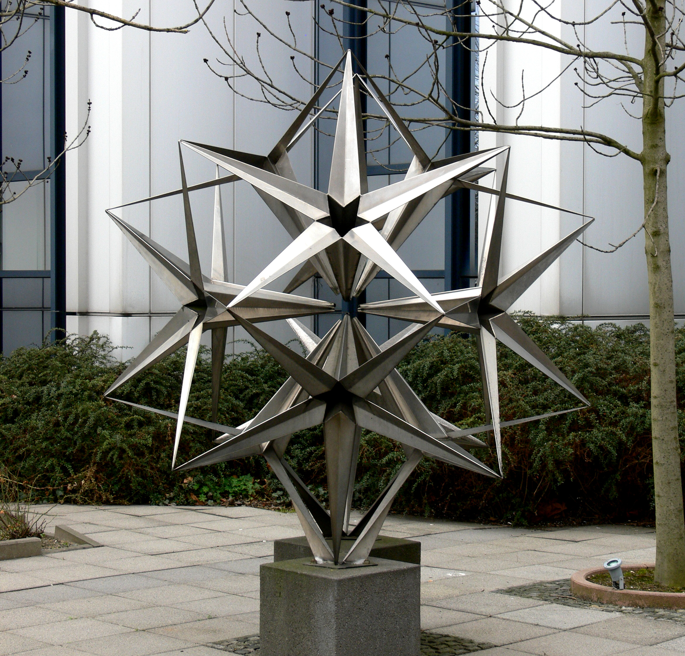 Johannes Belz: Blüten (auch bekannt als Dodekaeder oder Blütenstern), 1974, aufgestellt vor dem Hotel Mercure (Hotel an der Stadthalle), Chemnitz